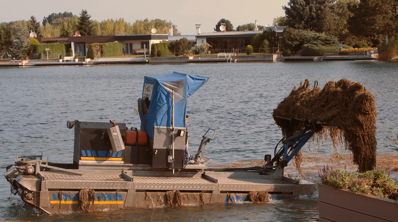 Mähboot beim Aufsammeln von zuvor geschnittenem Seegras